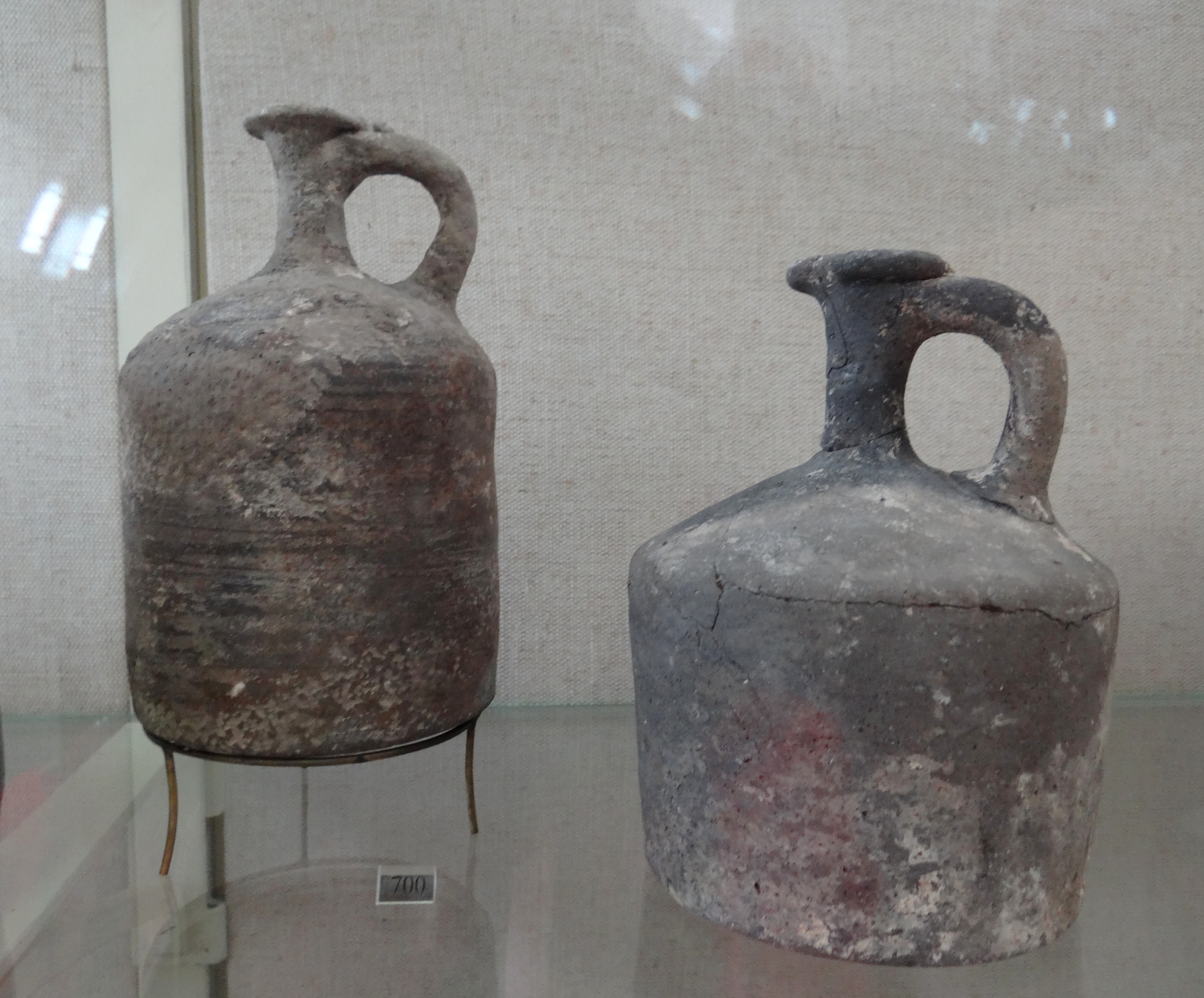 Tell el-Yehudiyeh ware Juglet.. Rockefeller Museum כלי תל אל יהודיה הינה קבוצת כלי קרמיקה ייחודית מתקופת הברונזה התיכונה II מוזיאון רוקפלר פכיות